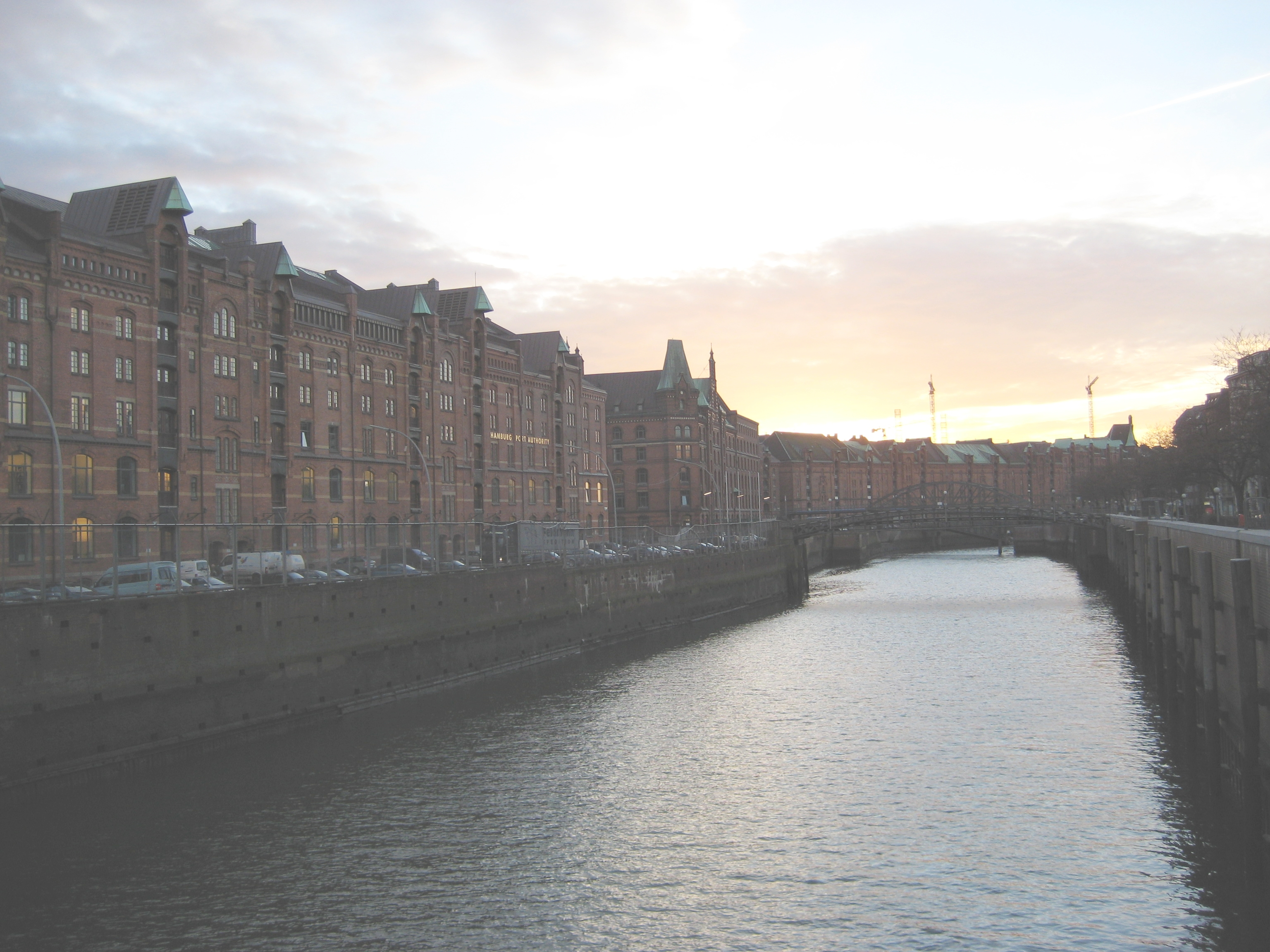 Hamburg, Speicherstadt vom Zollkanal gesehen